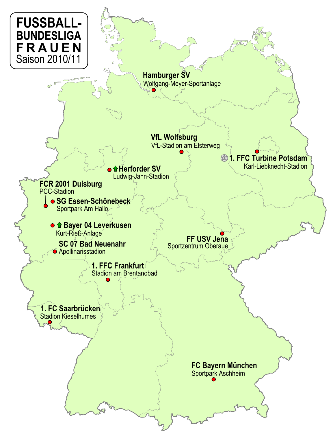 Karte der Vereine der Frauen Fußball-Bundesliga-Saison 2010/2011